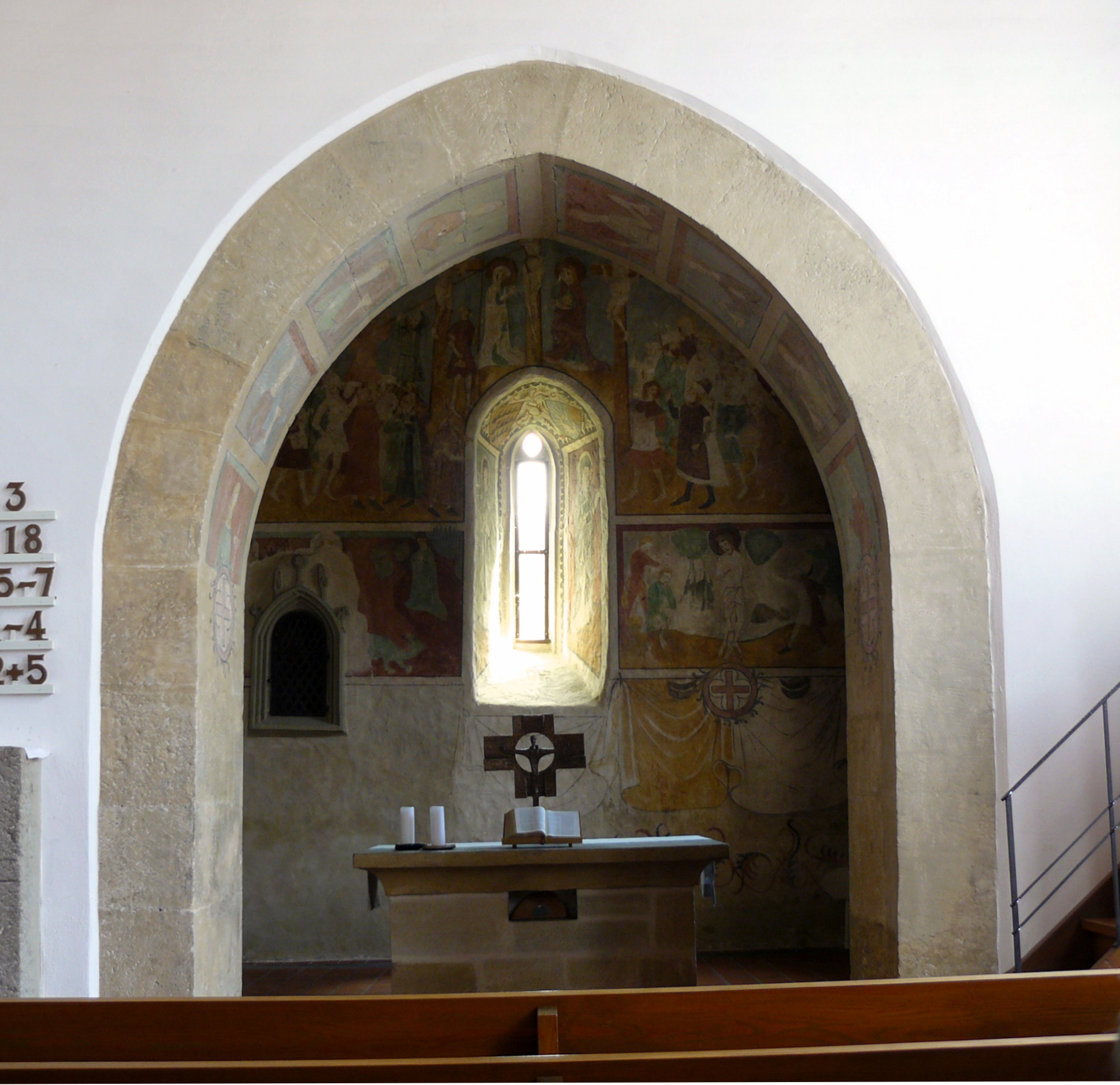 Chor der Nikolauskirche Mistlau, Gemeinde Kirchberg an der Jagst